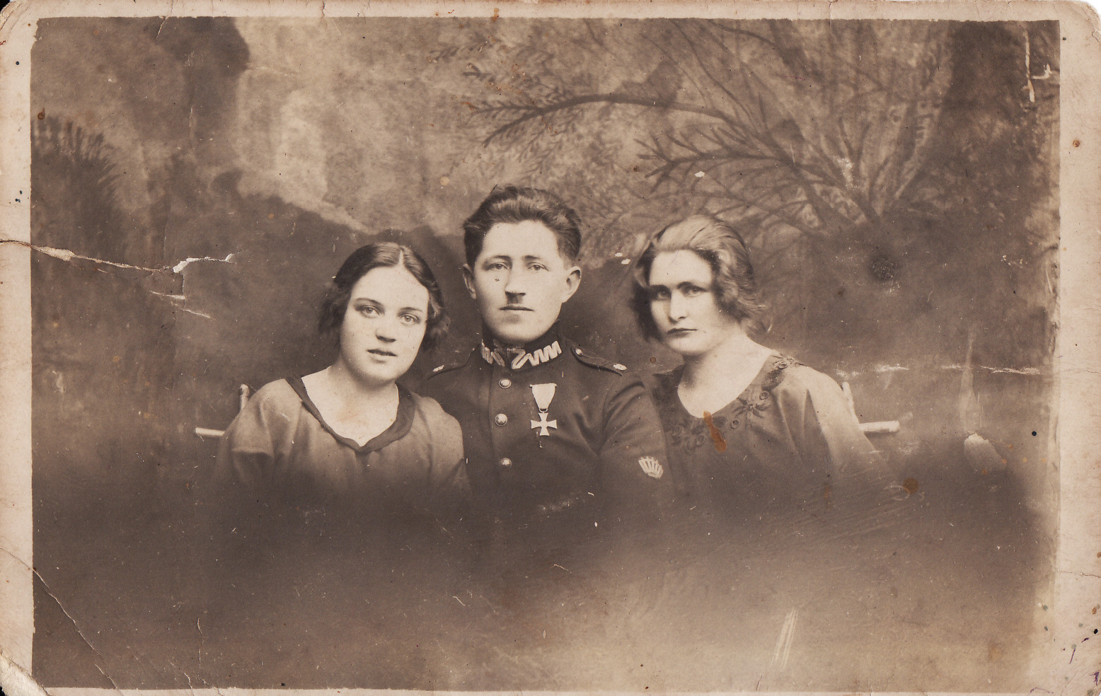 Władysław Mrozowski